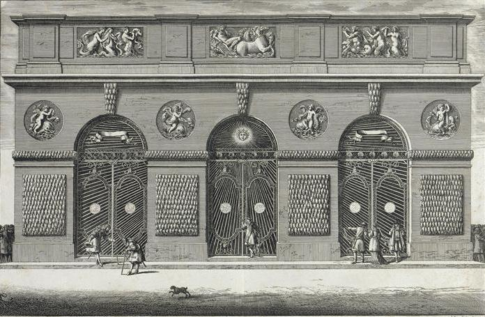 “Vue de la façade extérieure de la Grotte de Thétis de Versailles”